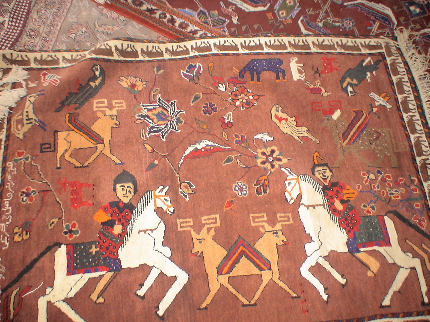 فرش ذهنی باف